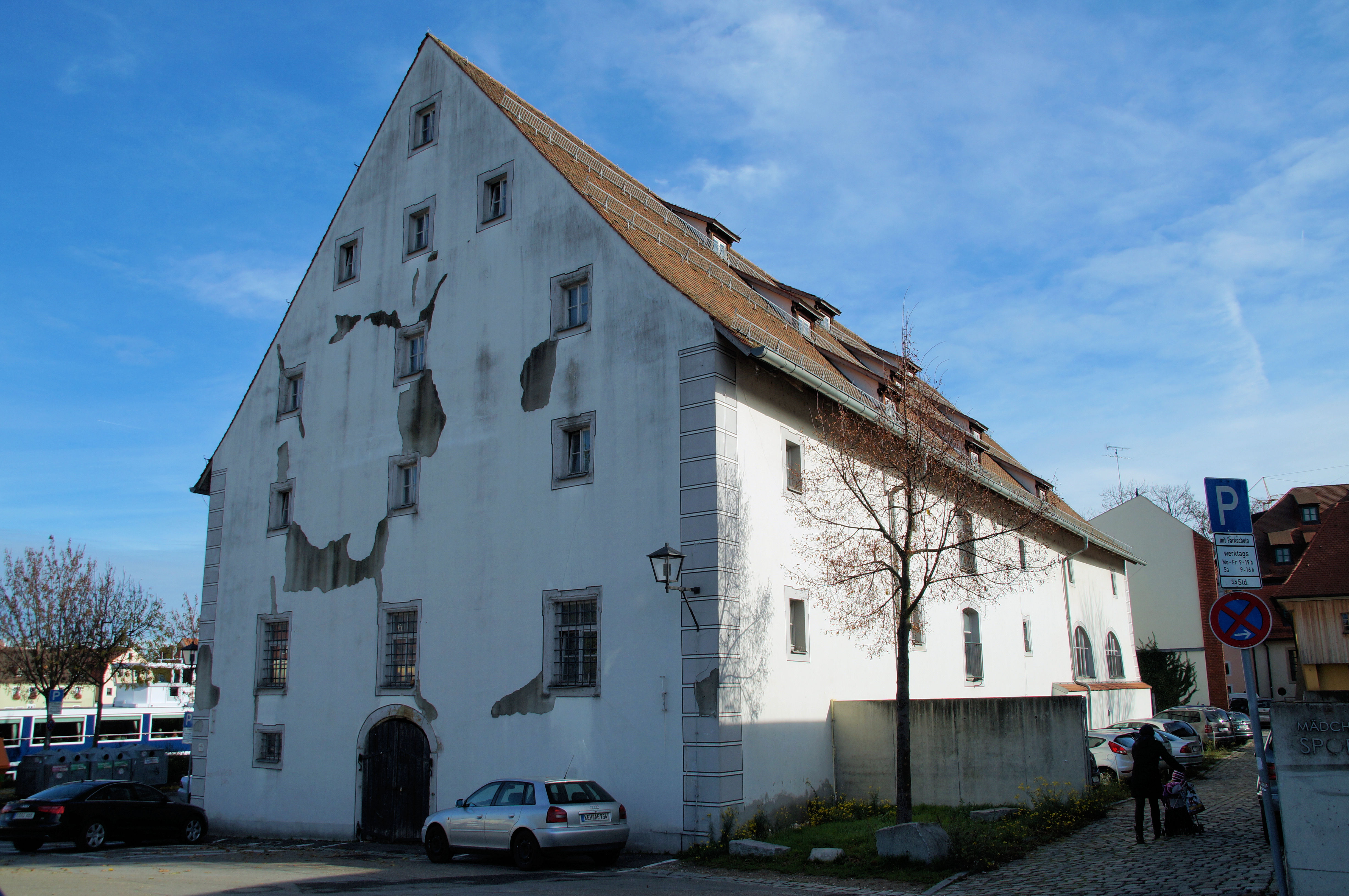 Stadel für das Braune Brauhaus, frei stehender dreigeschossiger Quaderbau mit Satteldach, bez. 1672, 1786 zum Salzstadel bestimmt